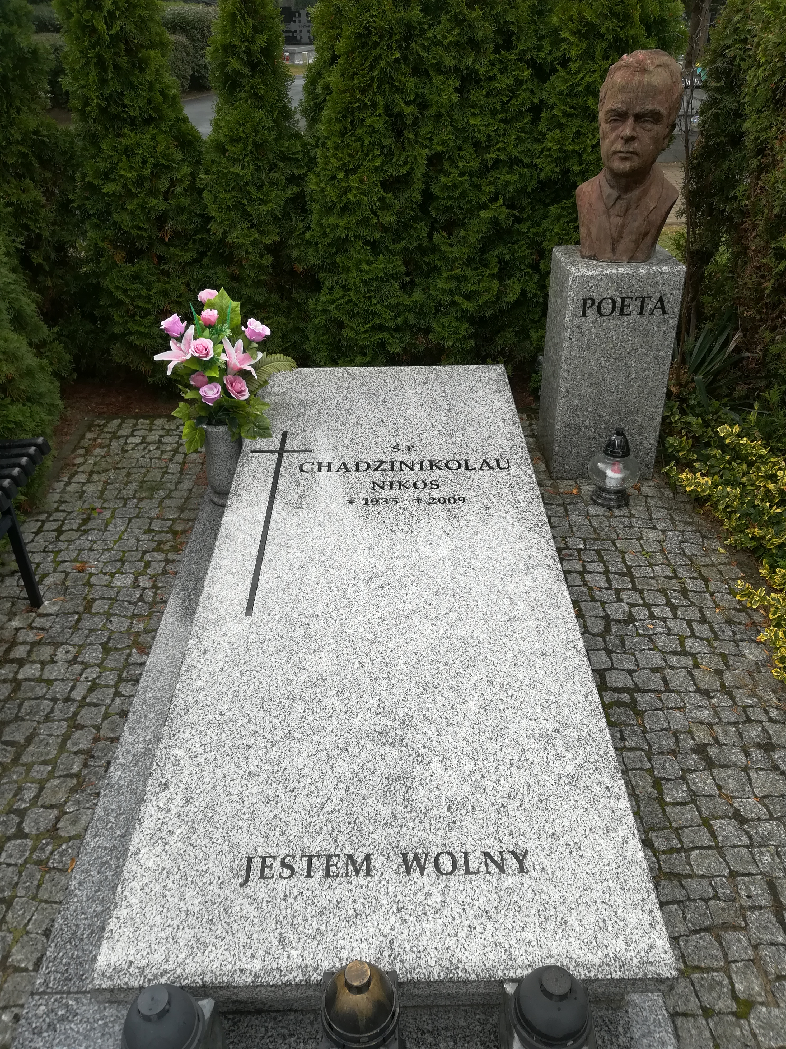 Cmentarz Junikowski - Poznań. Grób